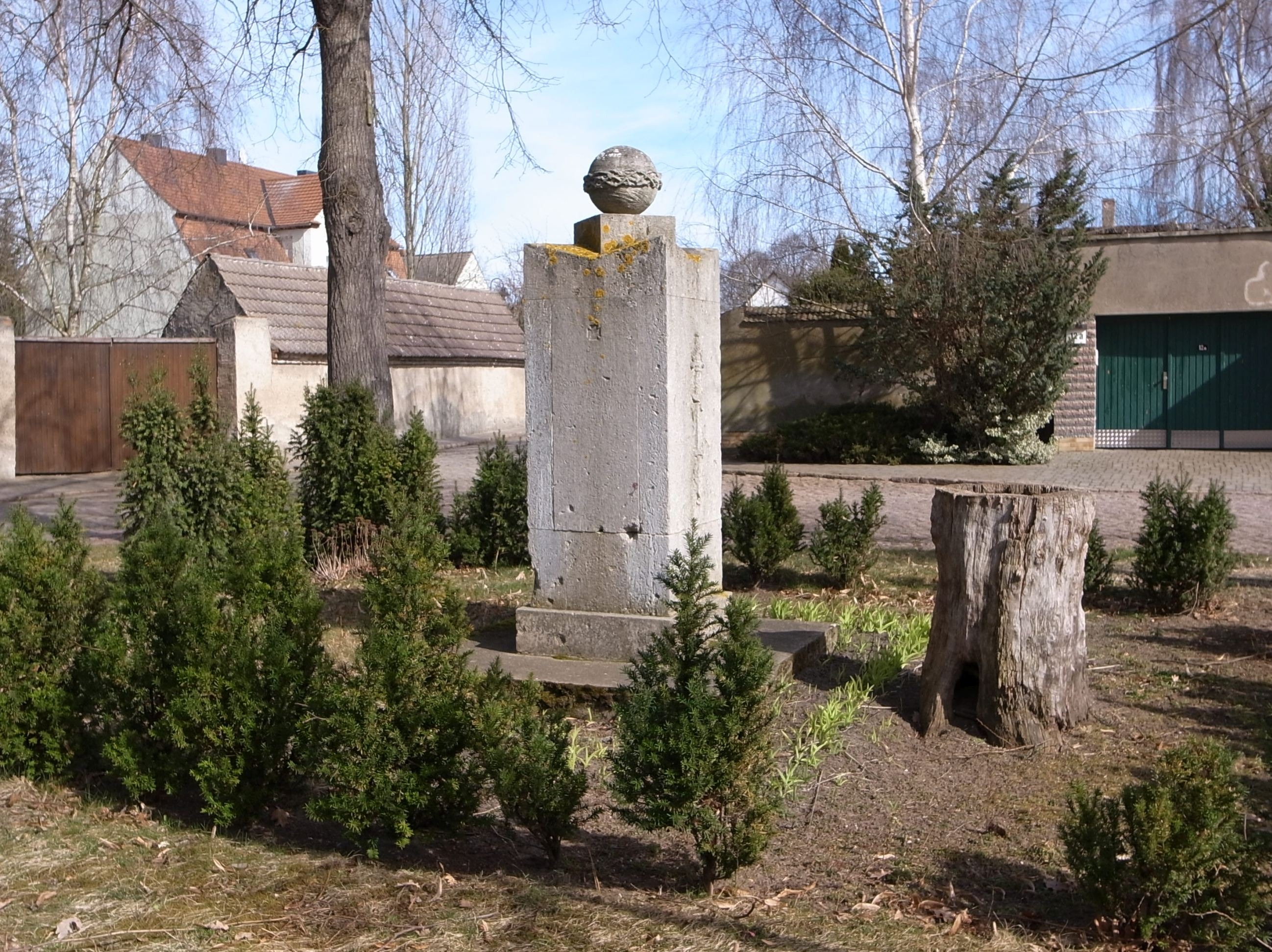 Barby (Elbe), Ortsteil Sachsendorf, Kriegerdenkmal. (Kulturdenkmal im Denkmalverzeichniss Sachsen-Anhalt, Erfassungsnummer: 094 98386 000 000 000 000 [1])